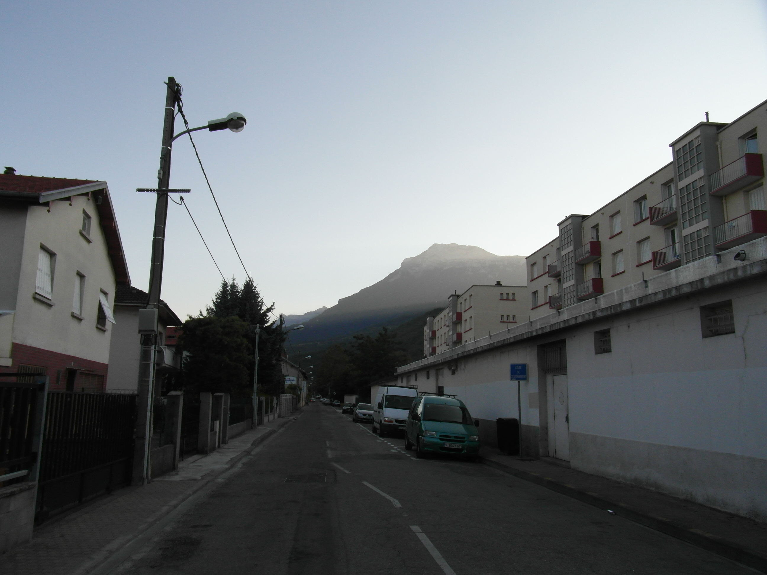 Rue Jean Bocq